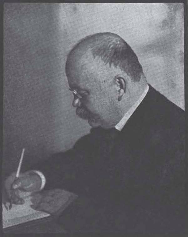 Portrait des Musikpublizisten Rudolf Louis